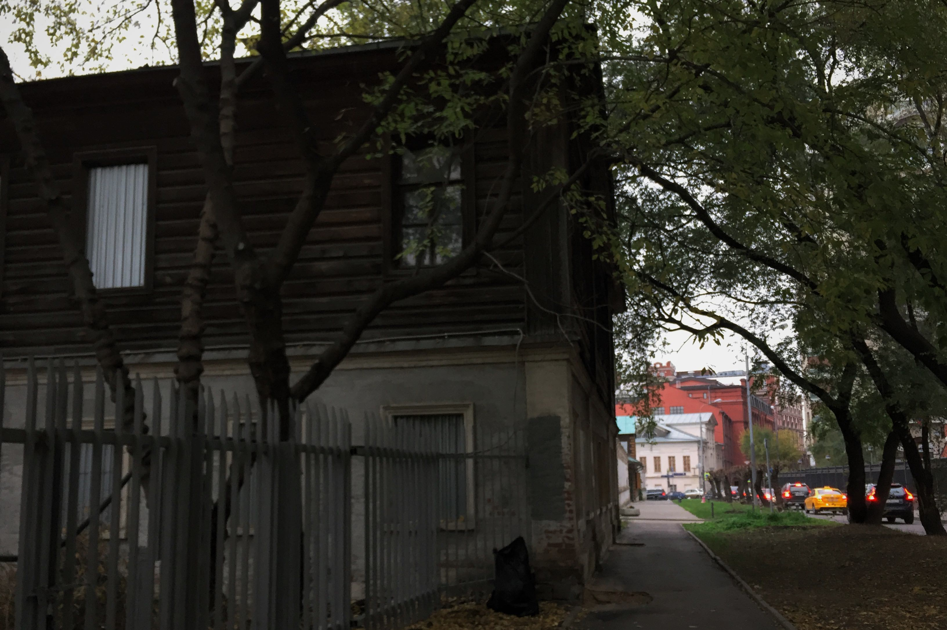 1-й Голутвинский переулок. Бывший дом семейства Третьяковых Moscow in 2016; Москва в 2016